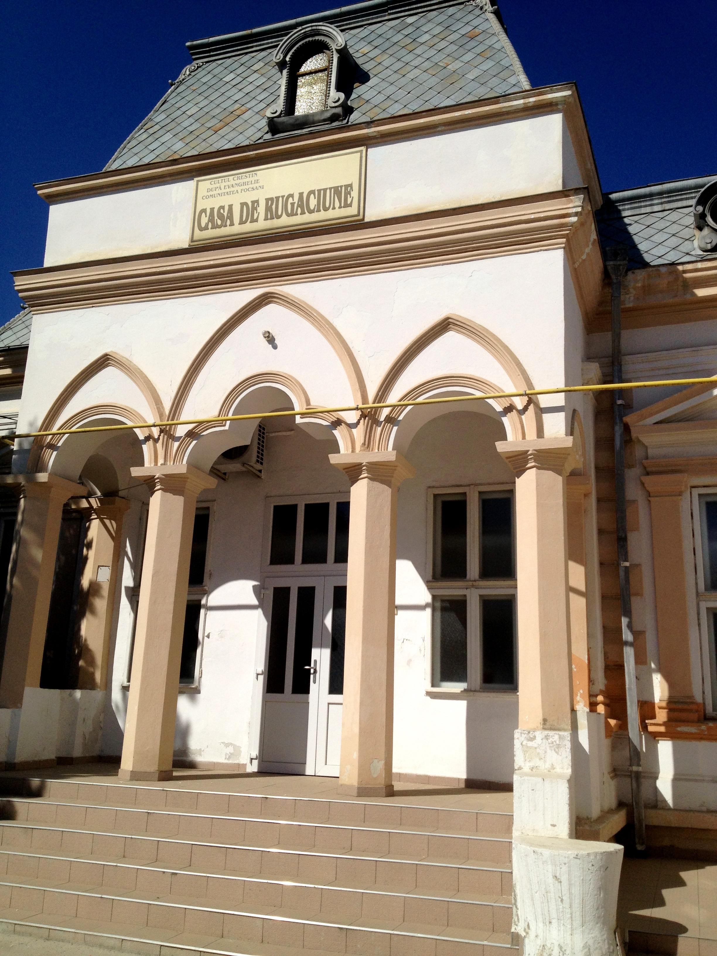 Casă de rugăciune din Focșani